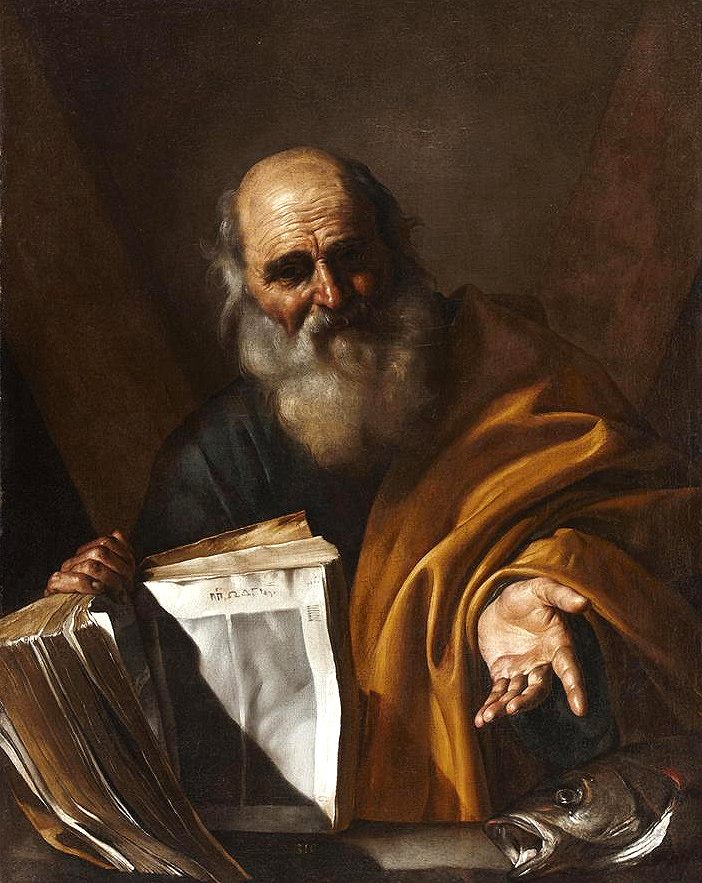 San Andrés